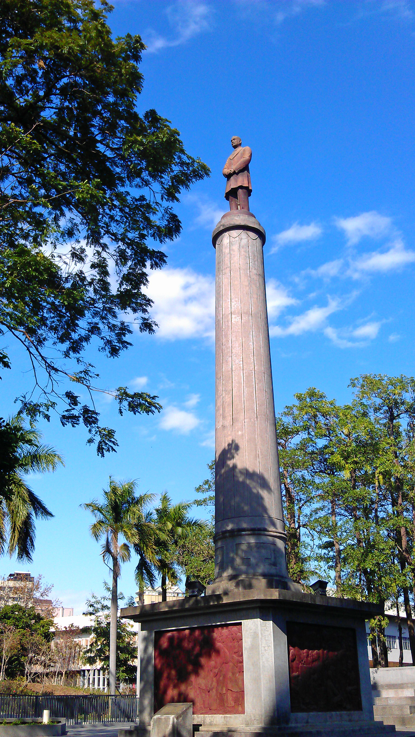 臺中市中山堂孫中山站像。